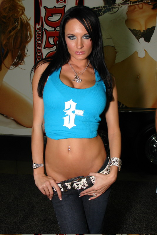 Alektra Blue depicted person: Alektra Blue (age: 23.60)